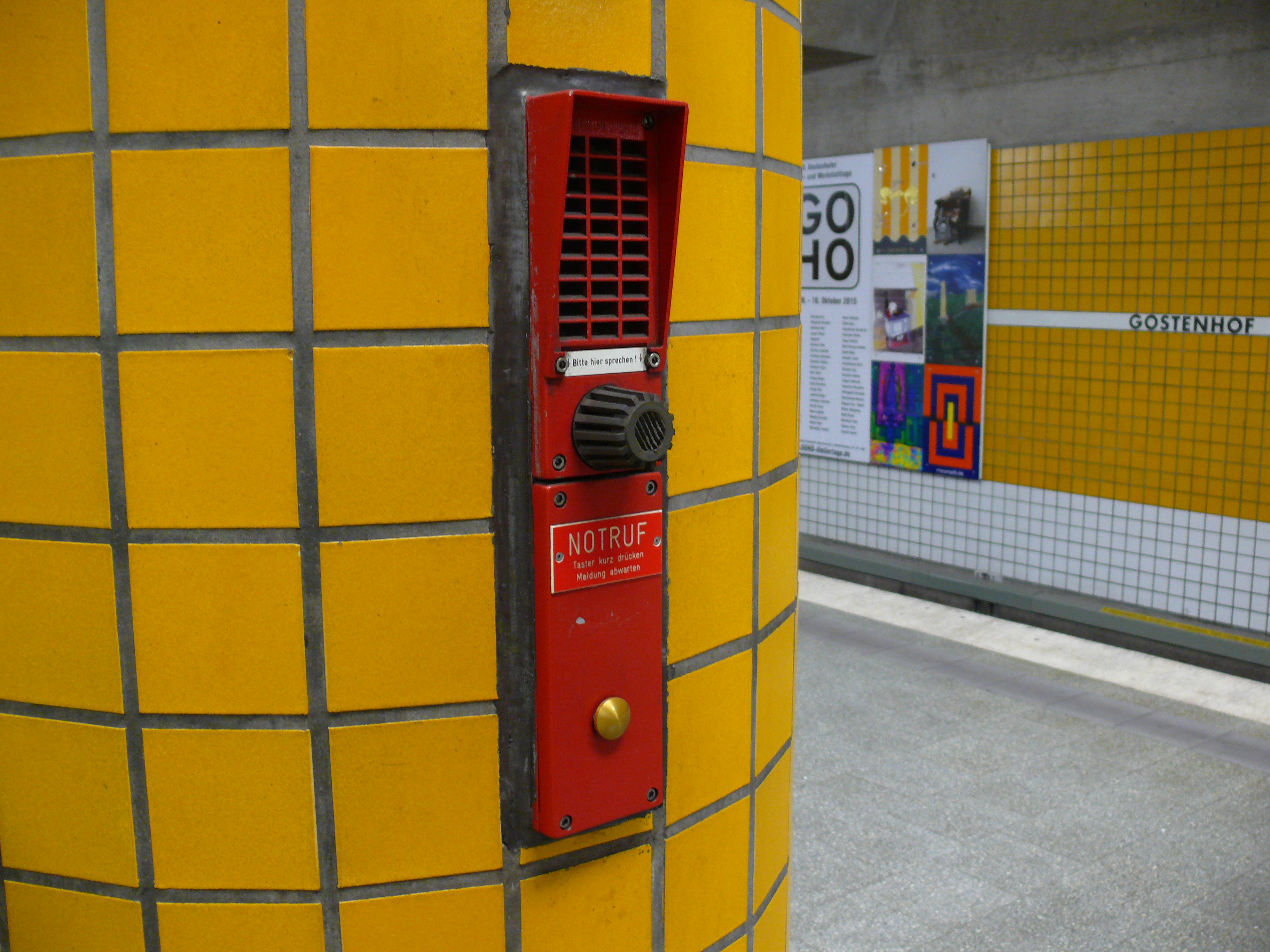 Historische Notrufvorrichtung am U-Bahnhof Gostengof in Nürnberg.